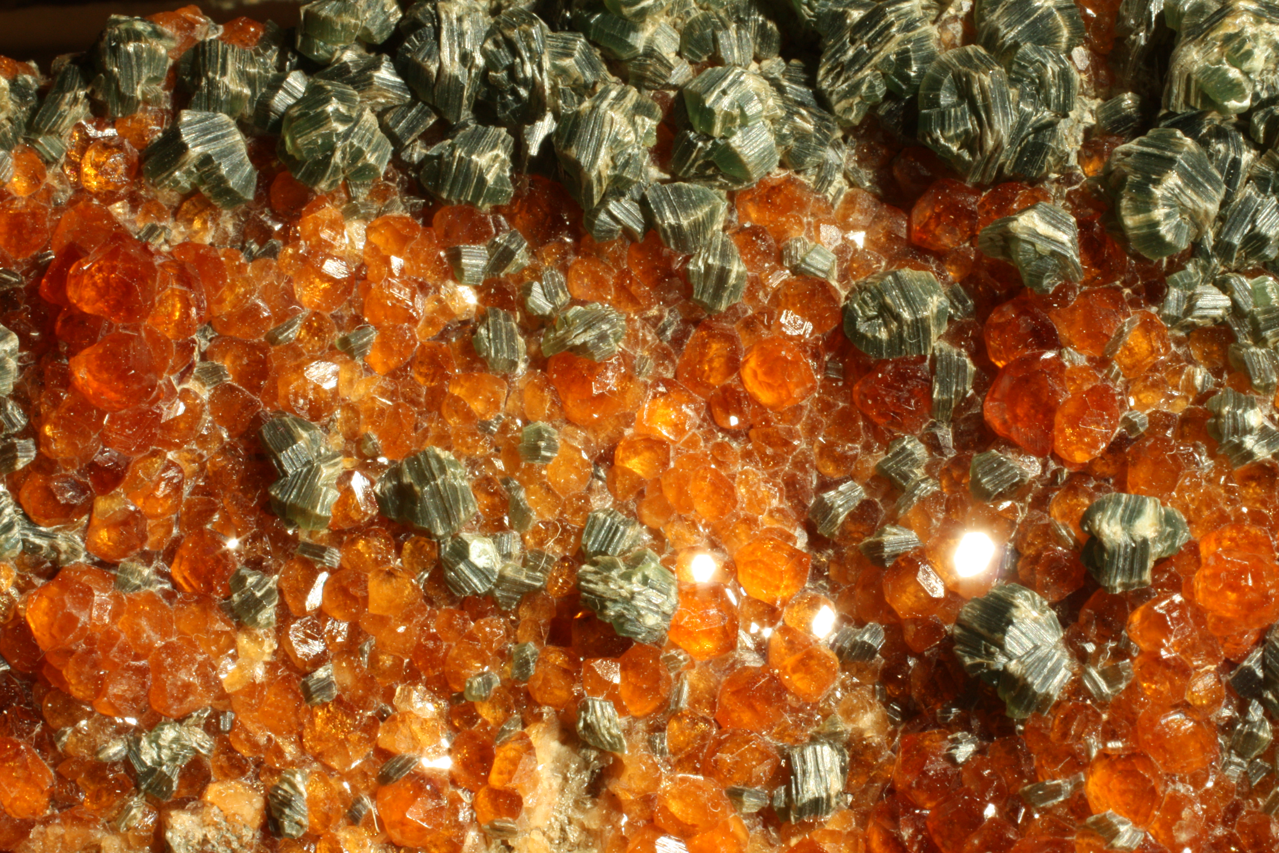 Grossulaire du Val d'Ala (Piémont, Italie) Collection Musée Vert, muséum d'histoire naturelle du Mans